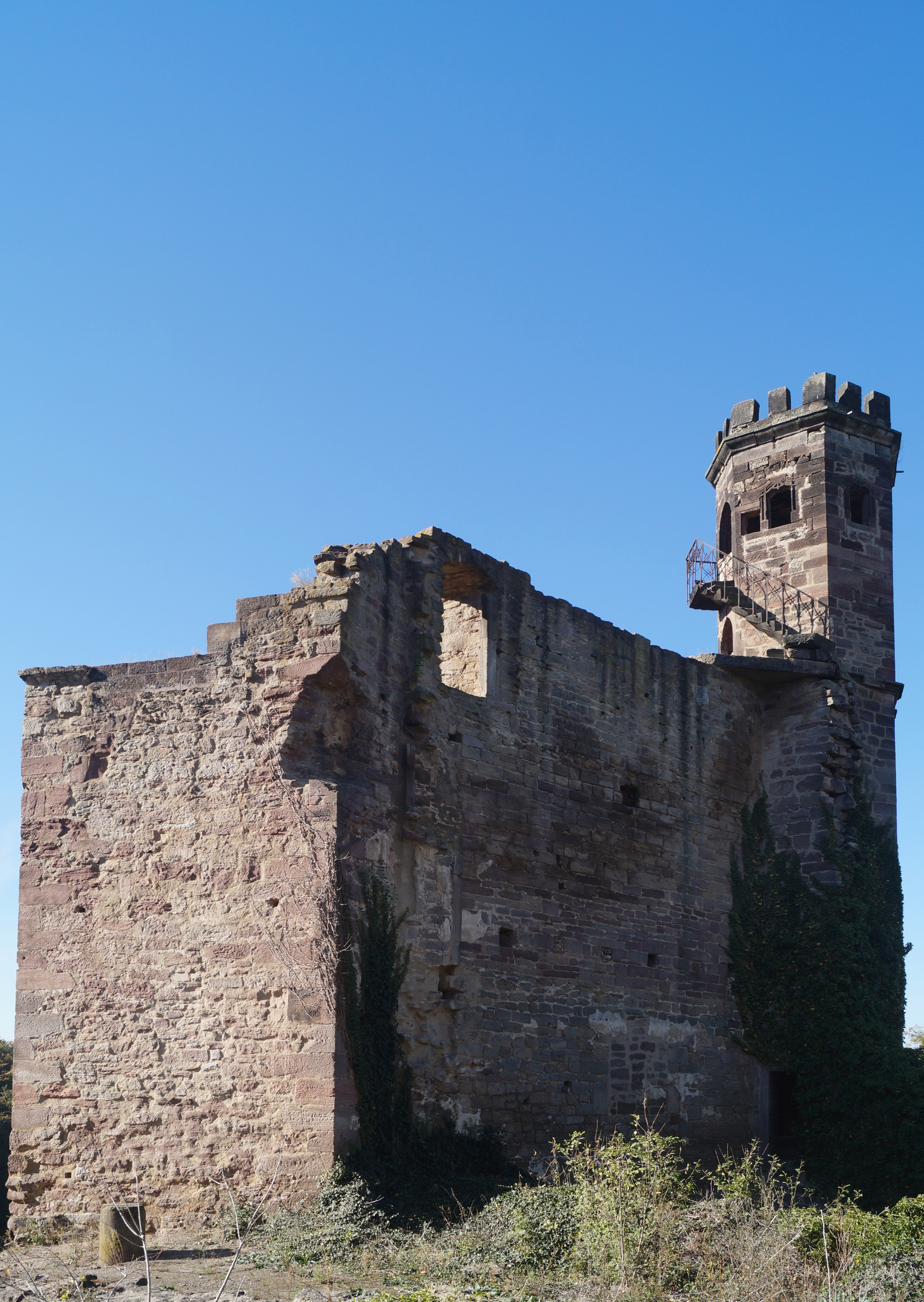 Ansicht des Hinterhauses mit neuzeitlichem Aussichtsturm der Burg Hardenberg von ONO.